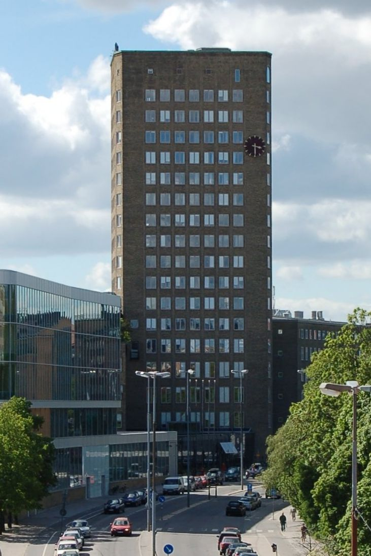 Bonnierskrapan på Torsgatan i Stockholm.